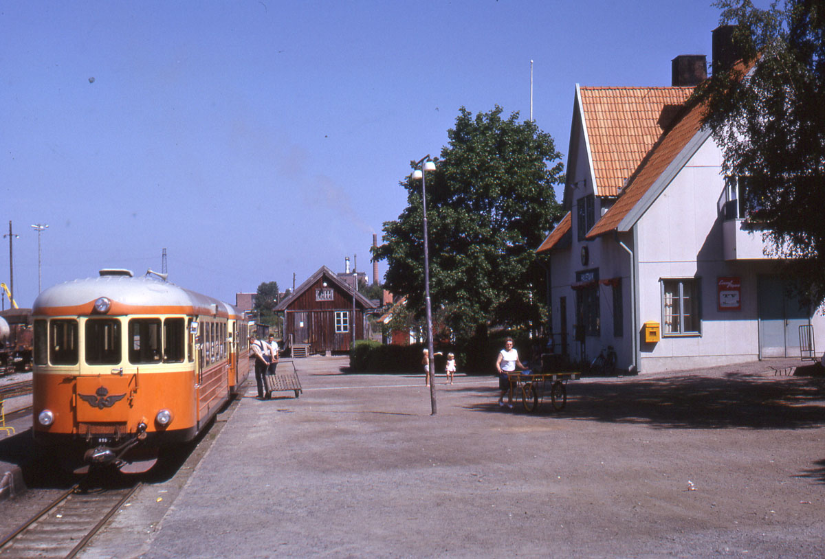 Rälsbusståg bestående av YBo5p (YP) med släp i Hallstavik på Roslagsbanan några månader innan persontrafiken nedlades i september 1966.